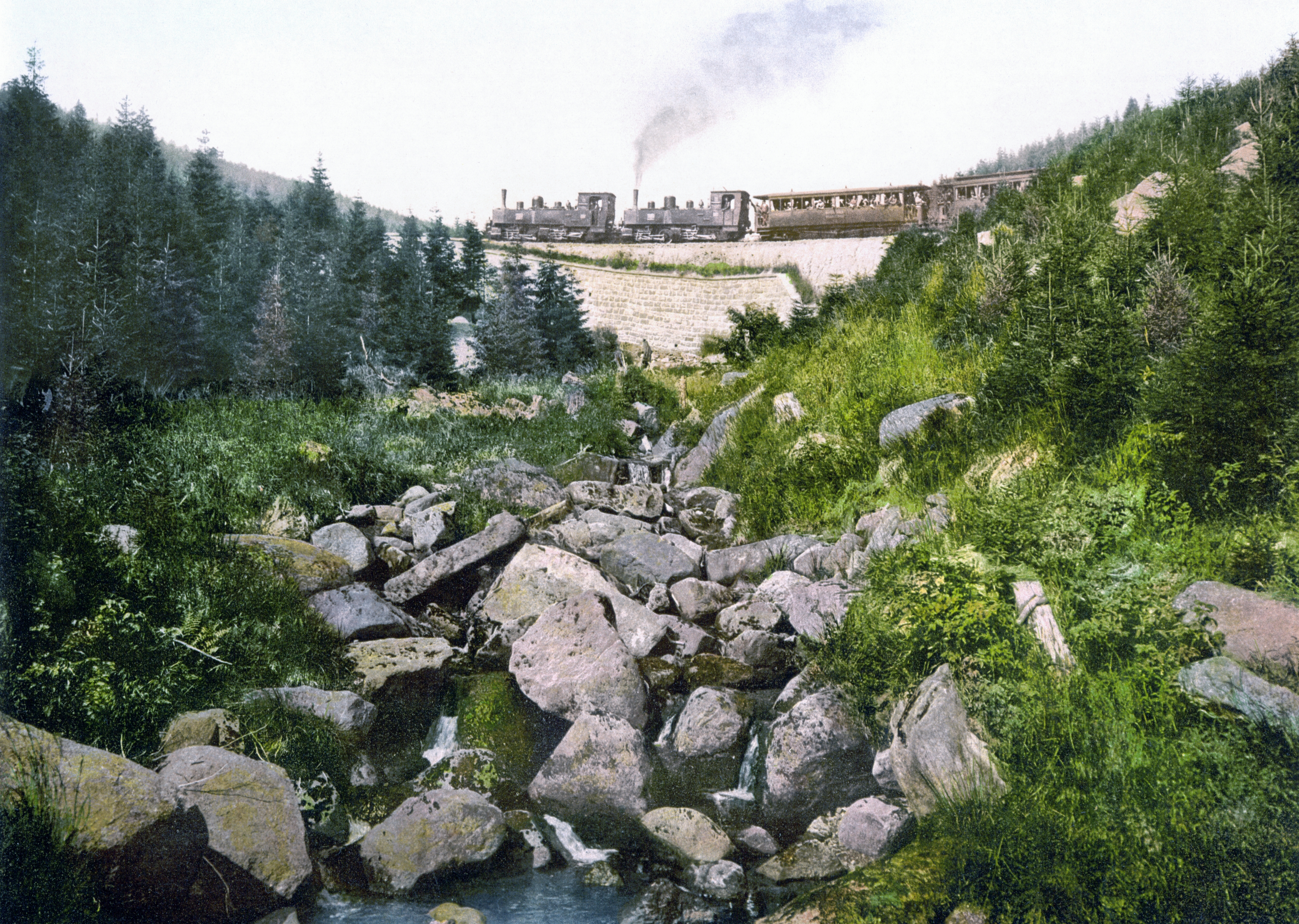 Brockenbahn, Harz